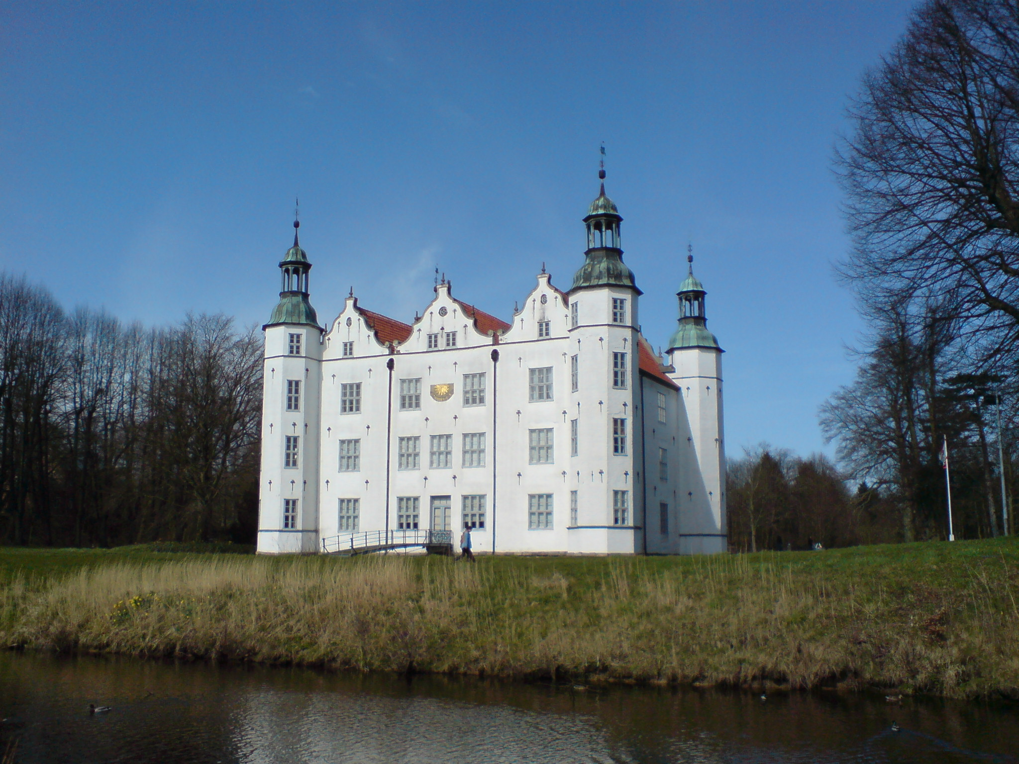 Schloss Ahrensburg von Südosten